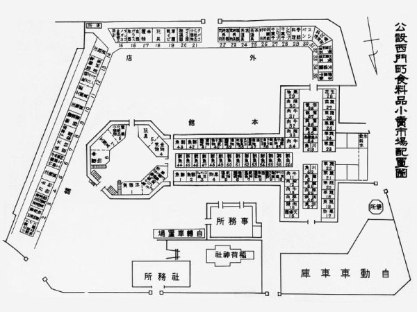 中文（台灣）: 日據時期台北西門市場及稻荷神社配置圖。